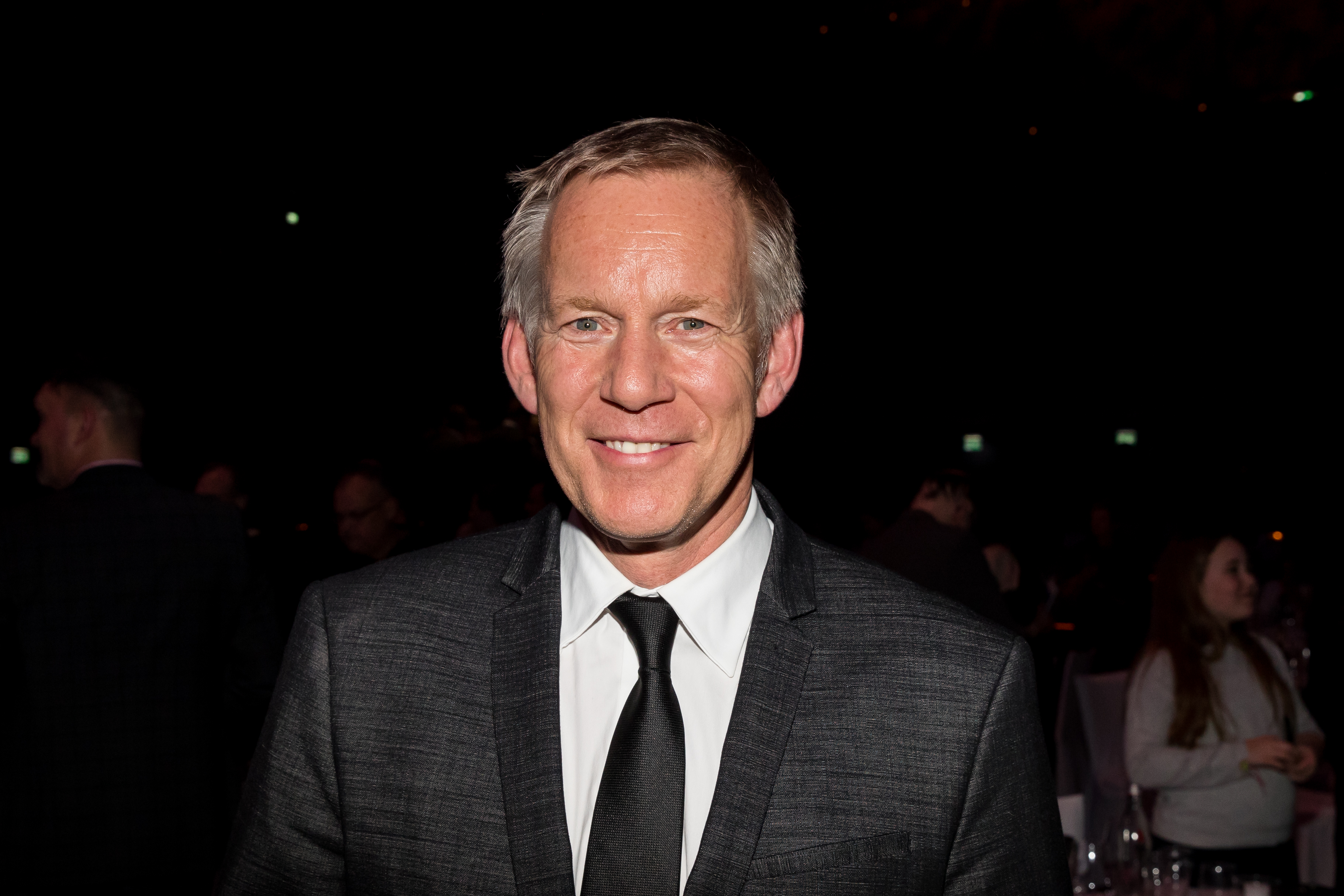 during Radio Regenbogen Award 2018 at Europapark, Rust, Baden-Württemberg, Germany on 2018-03-23, Photo: Sven Mandel